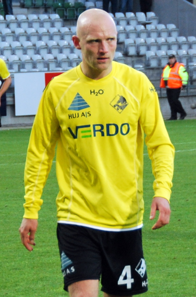 Fodboldspilleren Johnny Thomsen fra Randers FC. Her under en 1. divisionskamp mod Viborg FF på Viborg Stadion.